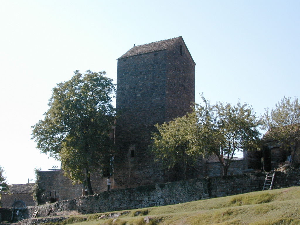 Torre defensiva con tejado a dos aguas,adosada a vivienda